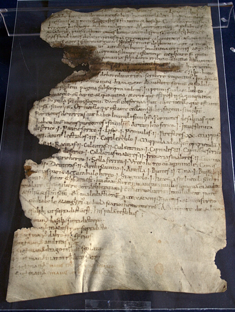 Oporuka Agape, kćeri zadarskog tribuna Dabra. 15. srpnja 999. U Zadru. HR -HDA-876-1. Hrvatski državni arhiv